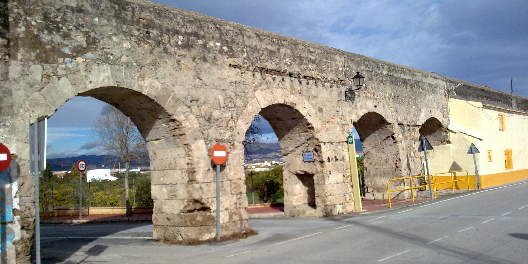 Arcos de Zapata de Alhaurín de la Torre